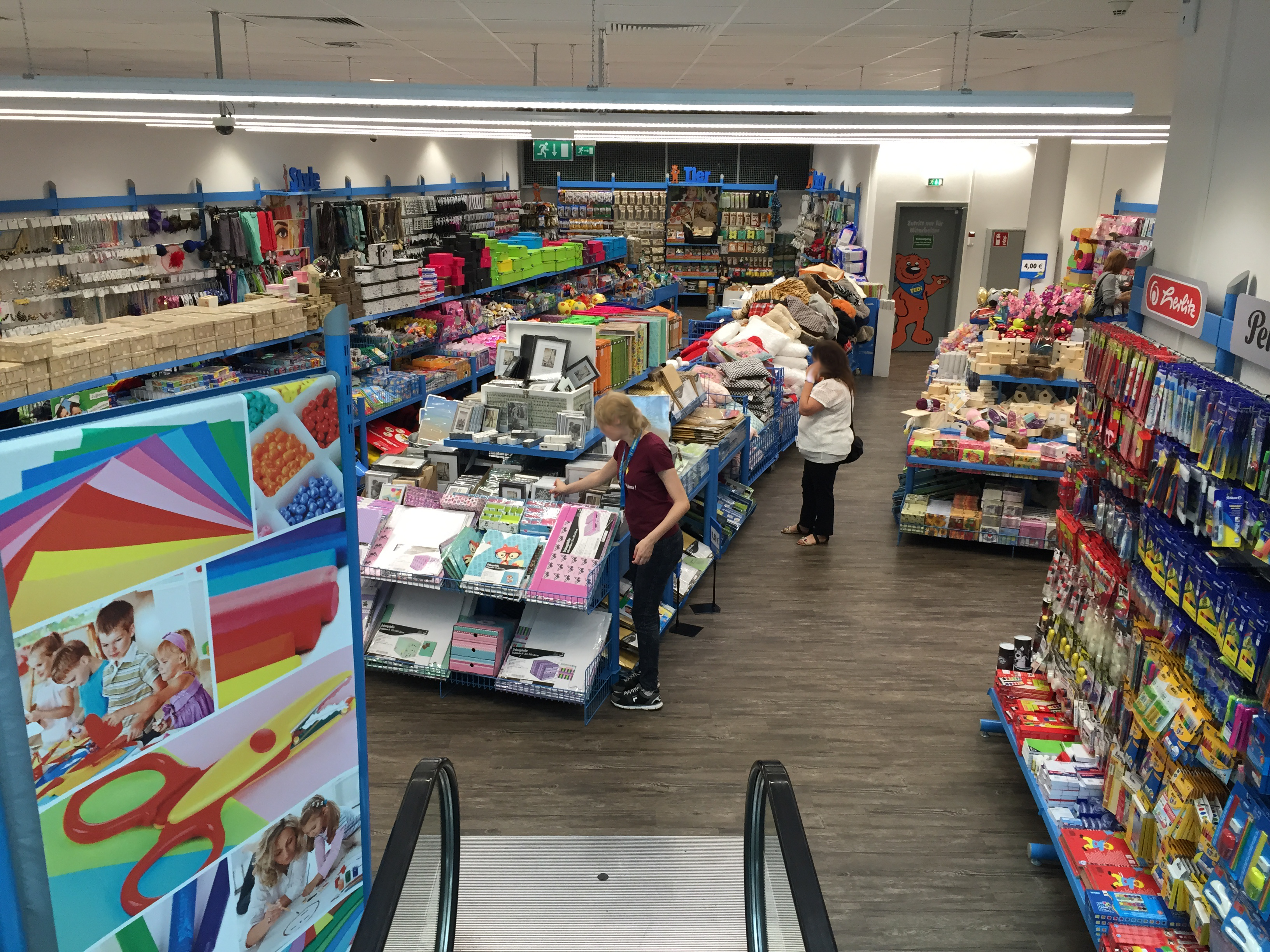 TEDi-Filiale in Offenbach am Main